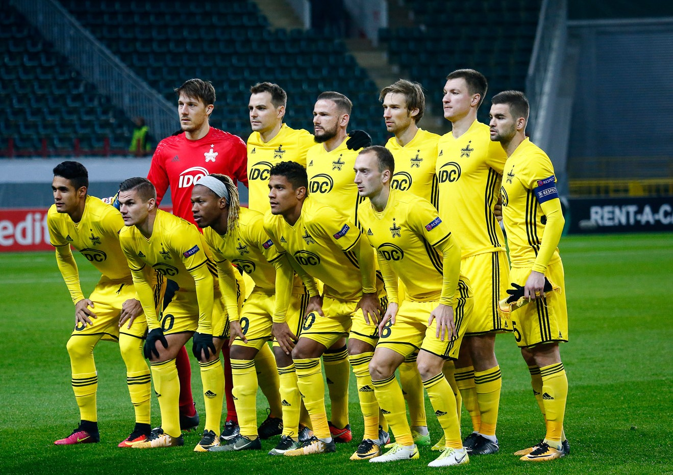 FC Sheriff Tiraspol